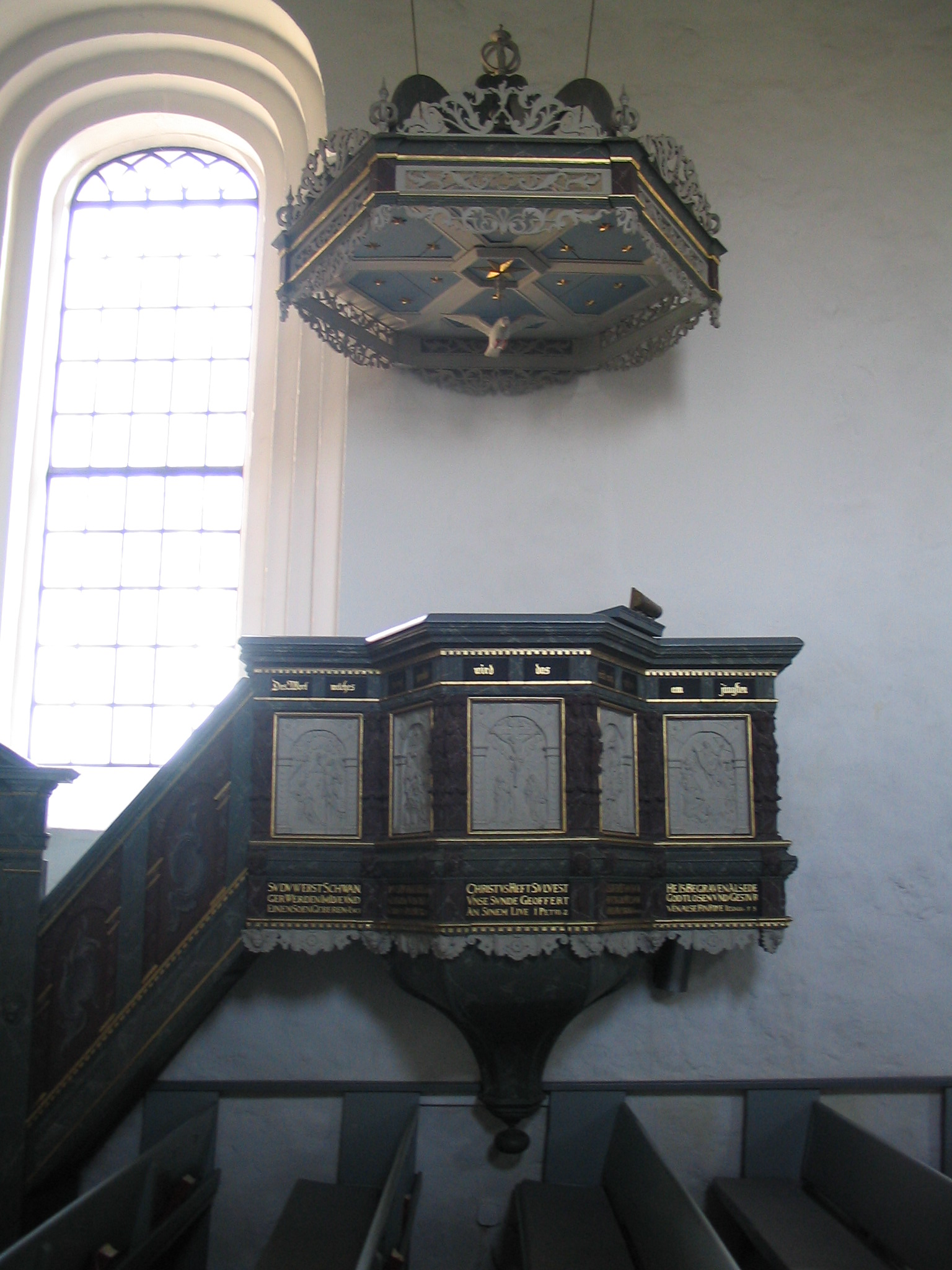 Kanzel in Grundhof. Der Schalldeckel ist später ergänzt worden.